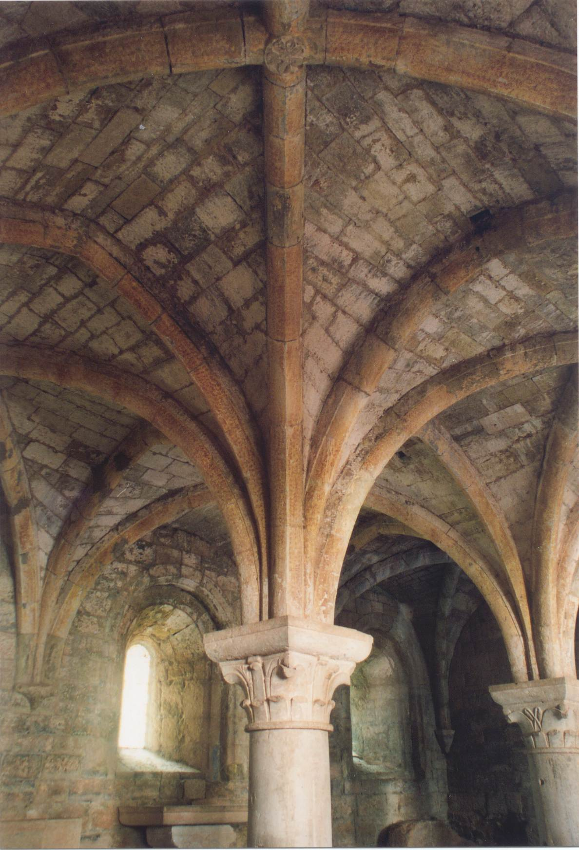 salle capitulaire de l'abbaye du Thoronet